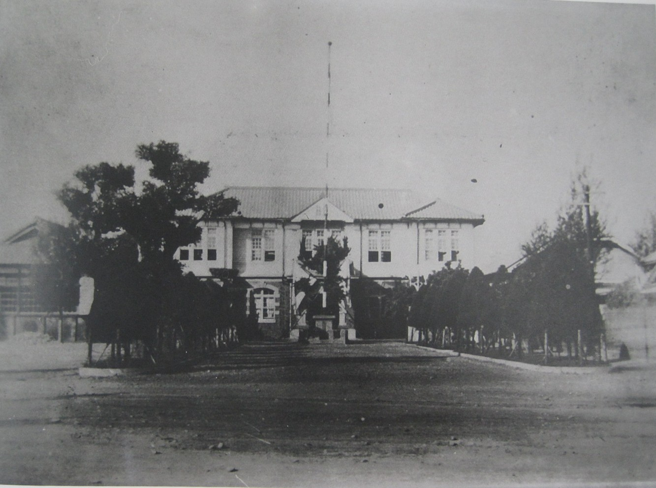 曾文郡役所